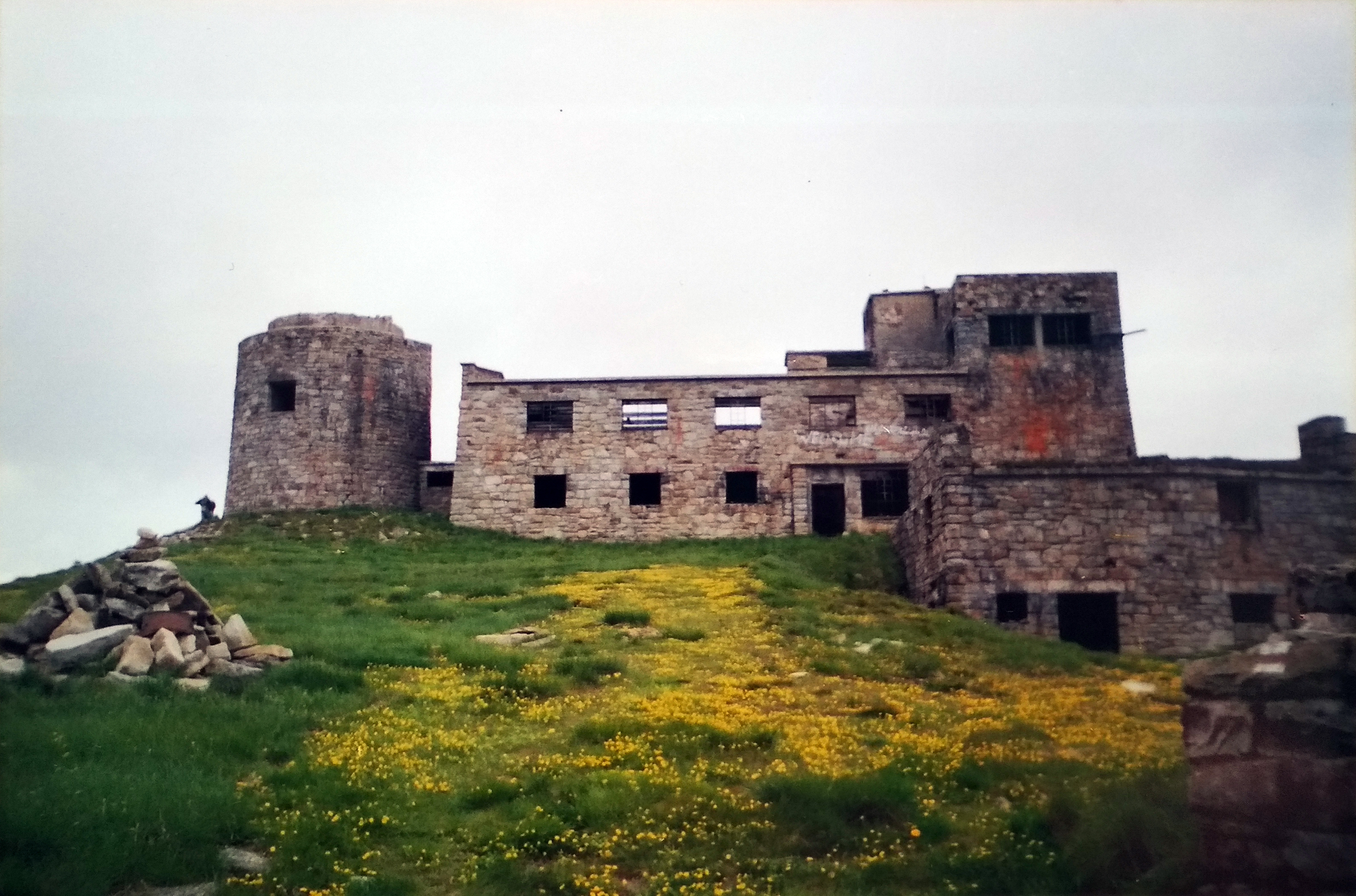 Обсерваторія, кінець червня 2002 р.